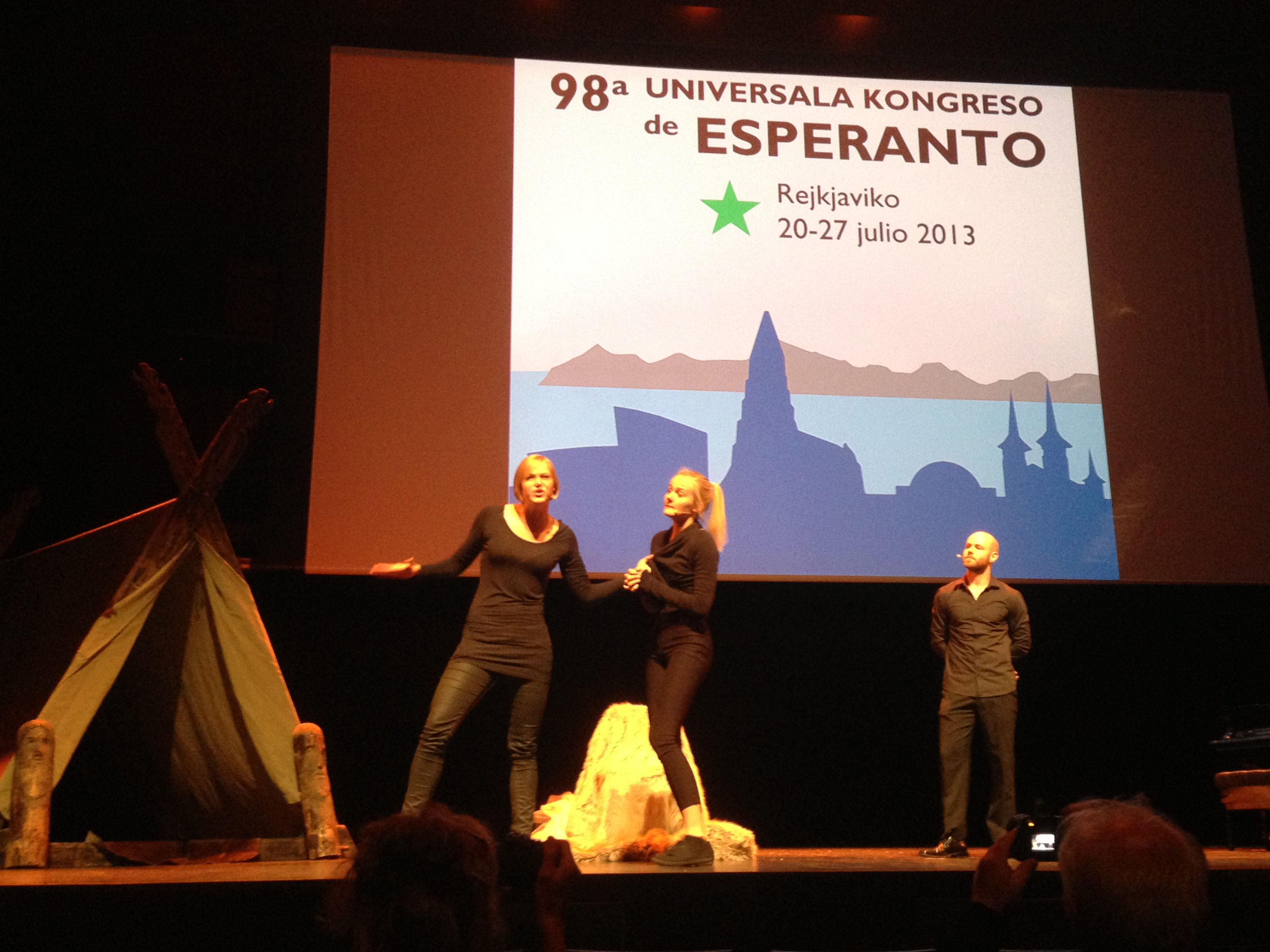 Teatraĵo pri la sagaoj dum la Nacia Vespero. Harpa. Rejkjaviko, Islando.